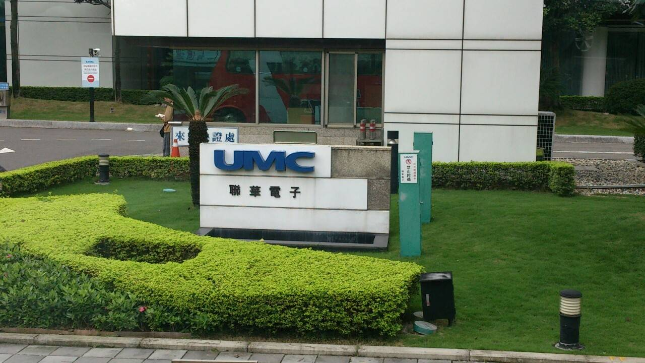 聯華電子位於新竹科學工業園區內的大門入口處